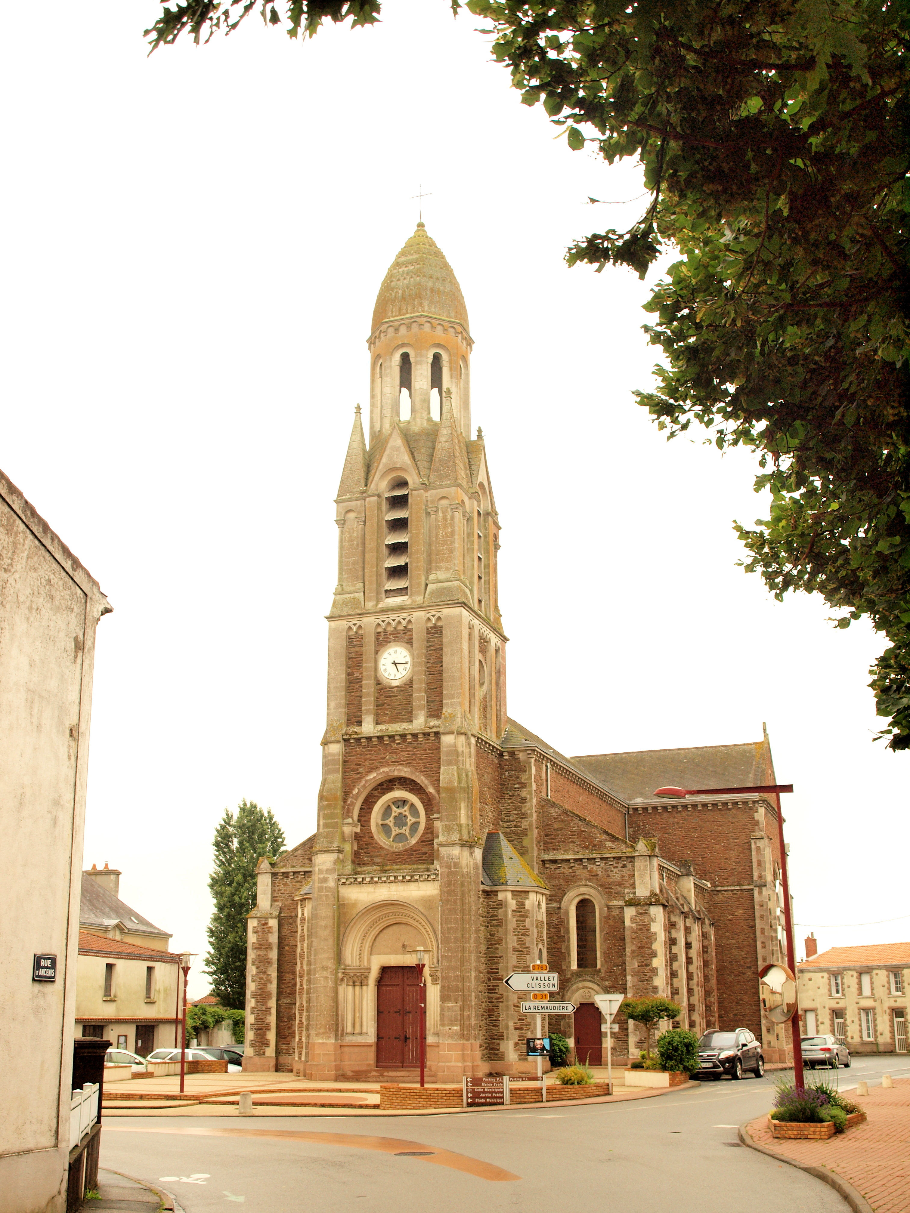 La Boissière-du-Doré (Loire-Atlantique, France)